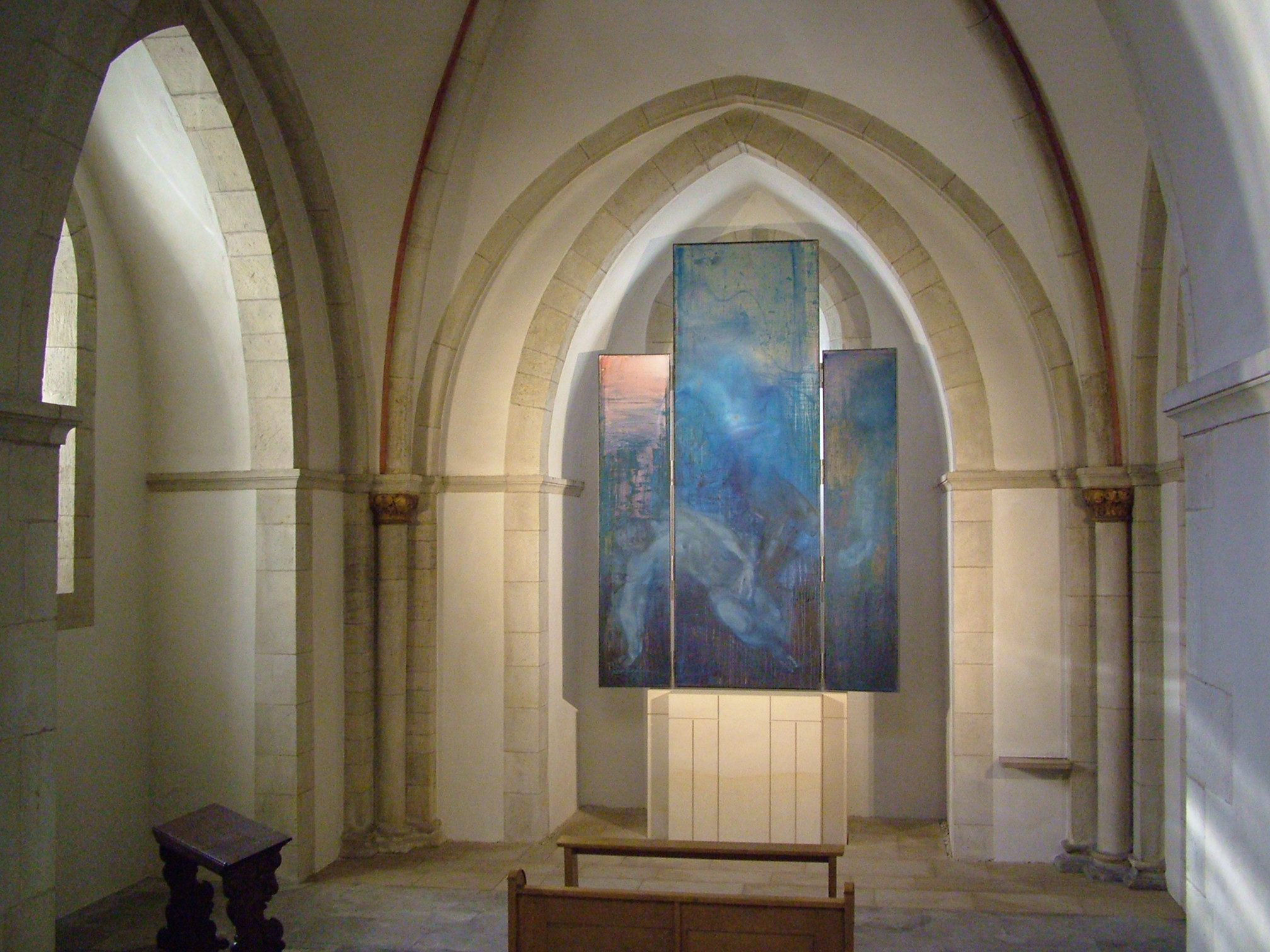 Münster St.-Paulus-Dom Innen